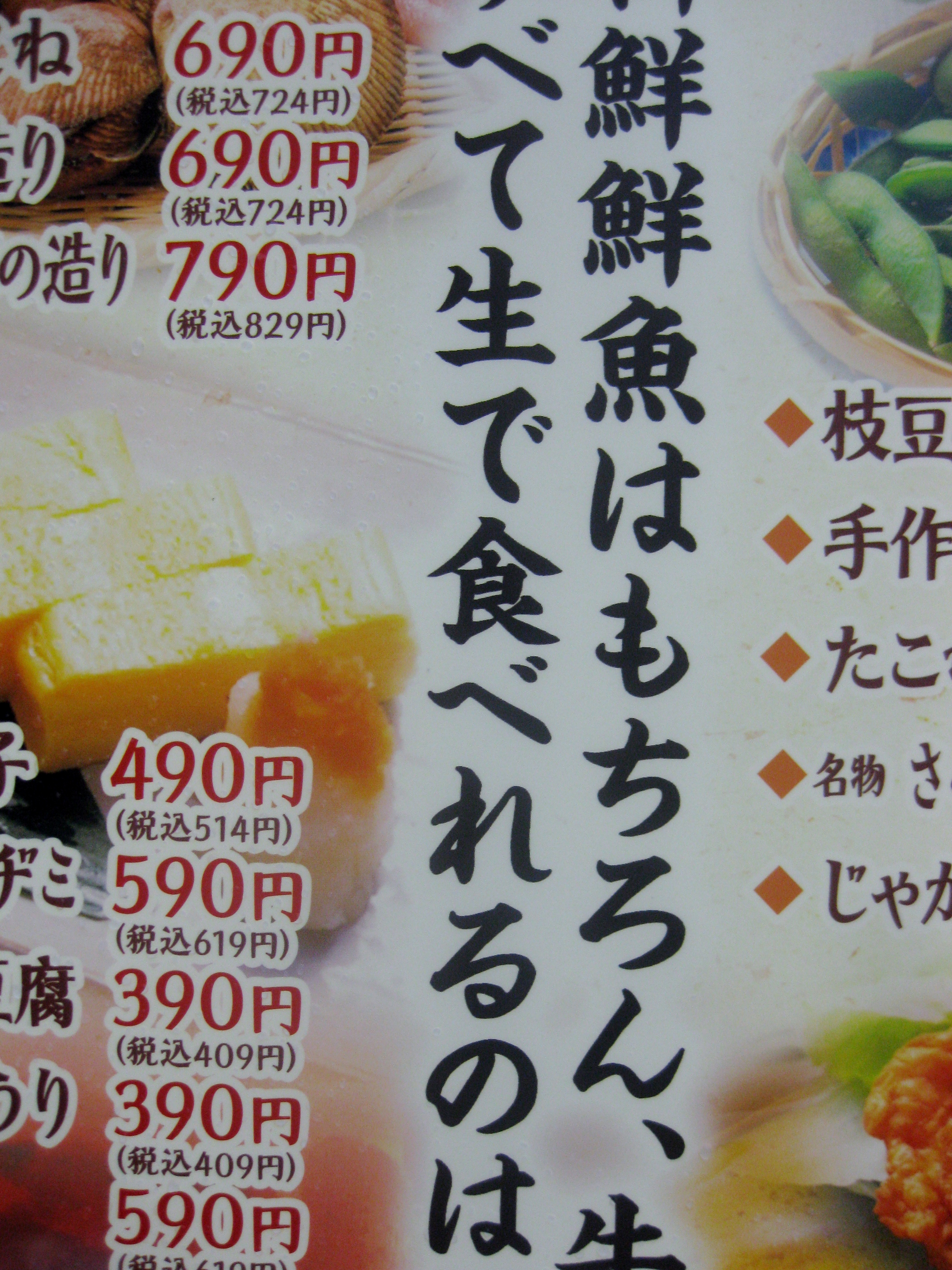 ら抜き言葉の例。兵庫県西宮市内の飲食店で撮影。